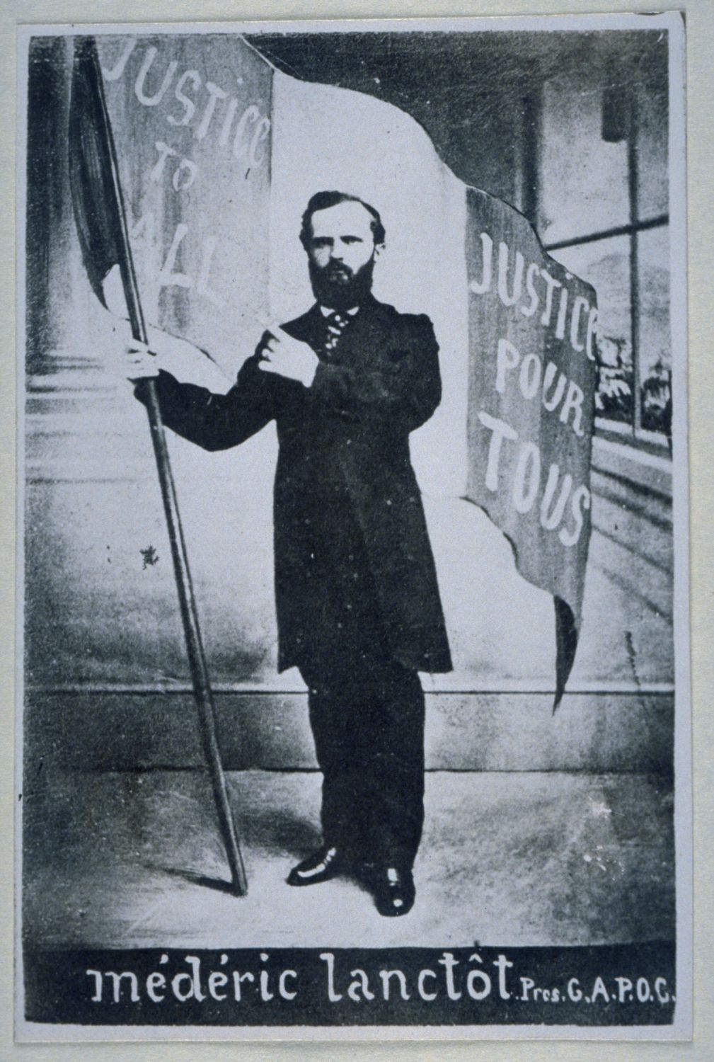 Photographie de Médéric Lanctôt, probablement prise vers 1867